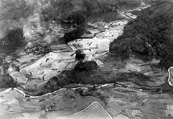 Repronegatief. Bergsawah's bij Patjet op Malabar, 1500 m.